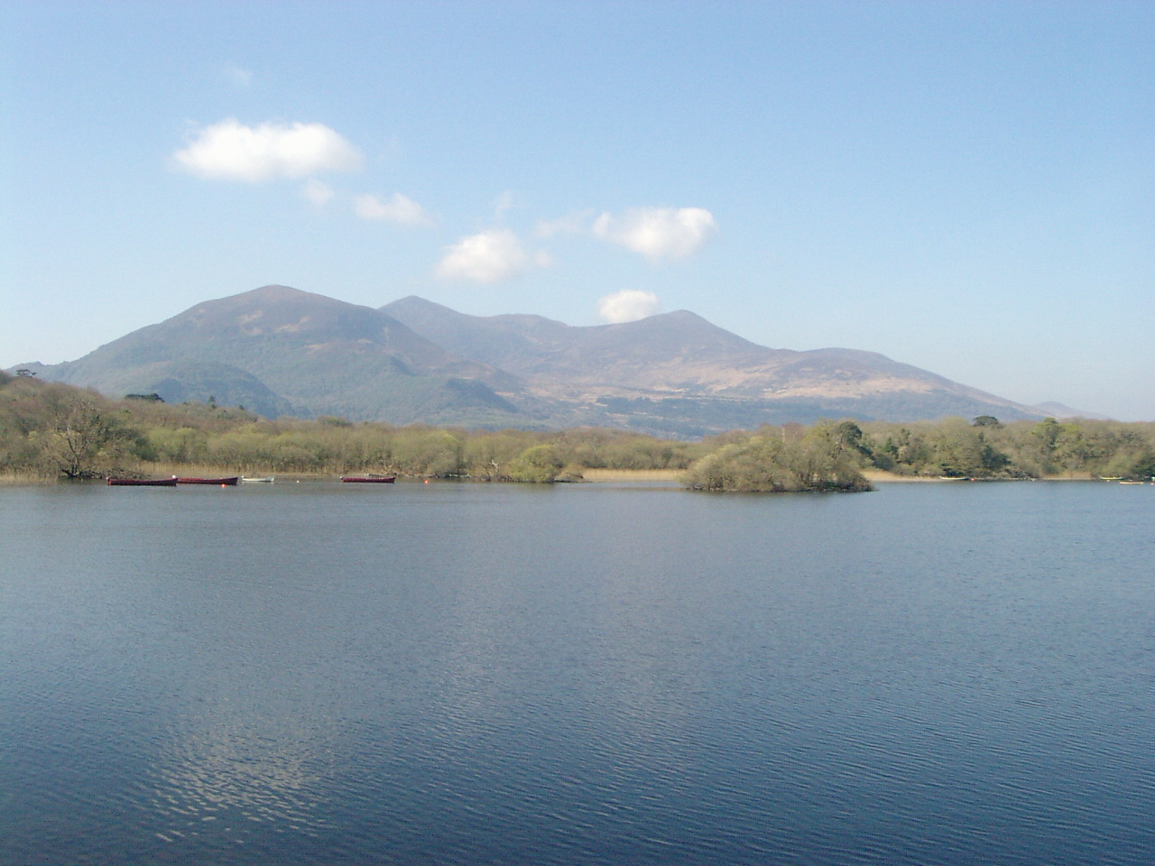 Uitzicht vanaf Ross Catle